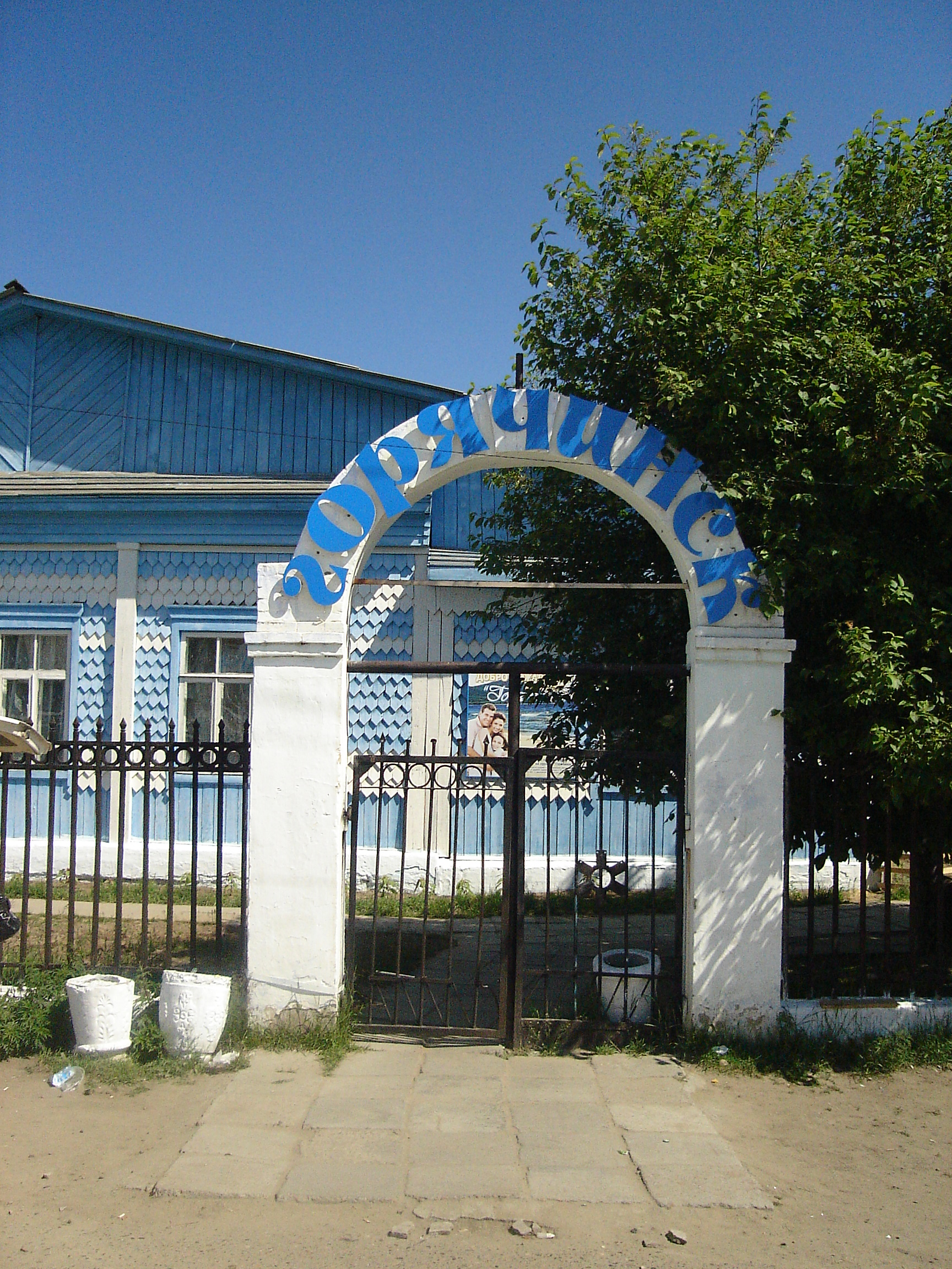 Село Горячинск, Республика Бурятия, Россия. Вход на курорт "Горячинск"